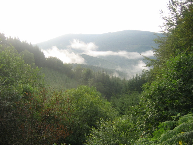 Paysage du Morvan, Bourgogne, France